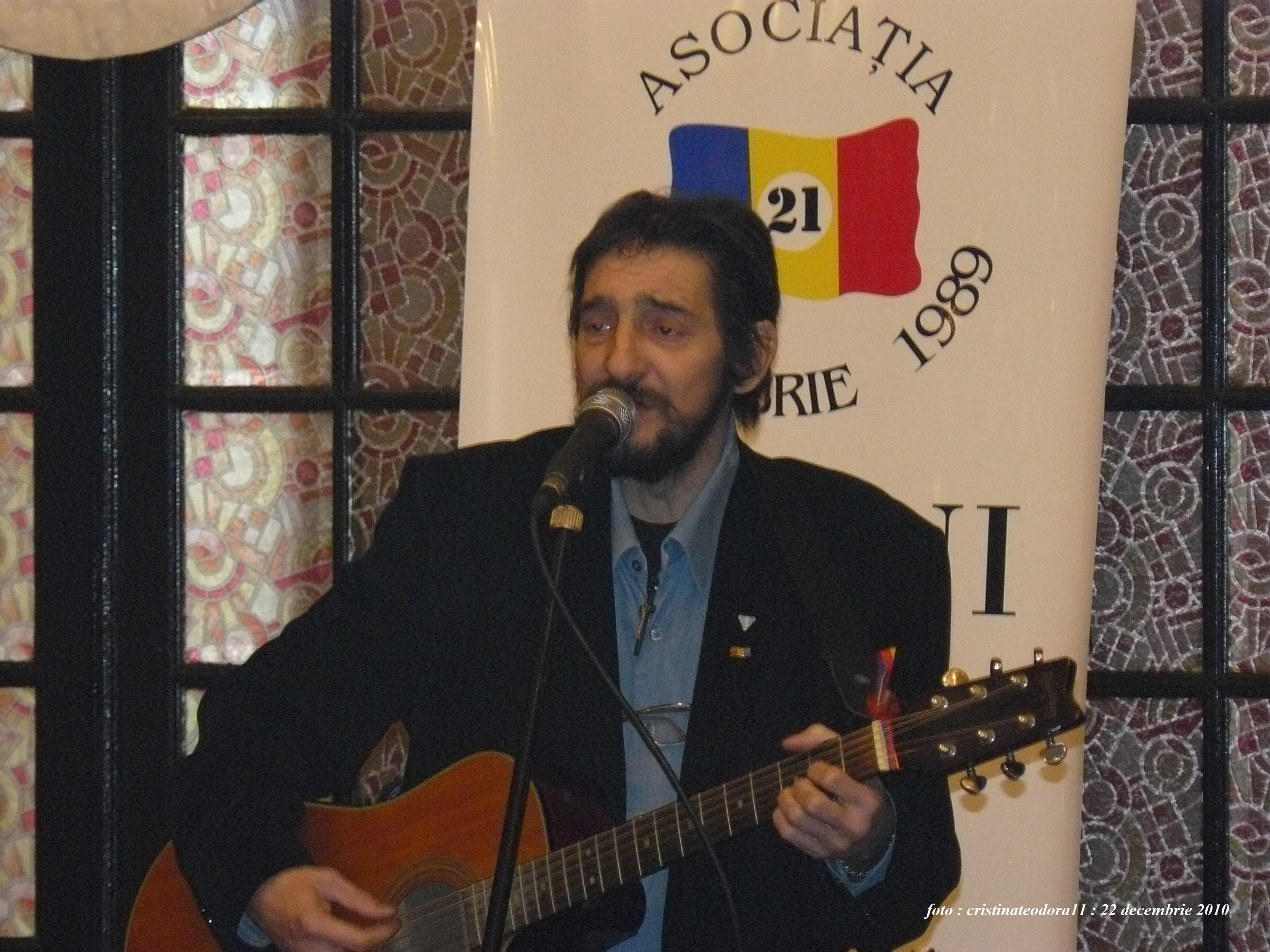 La Pomul de Crăciun din 22 decembrie 2010, organizat pentru copiii membrilor Asociației ”21 Decembrie 1989”, Cristian ne-a cântat Colinde. Pentru ultima dată...